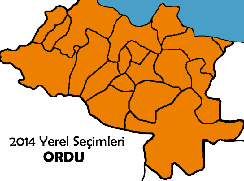 Ordu'da 2014 Türkiye yerel seçimleri